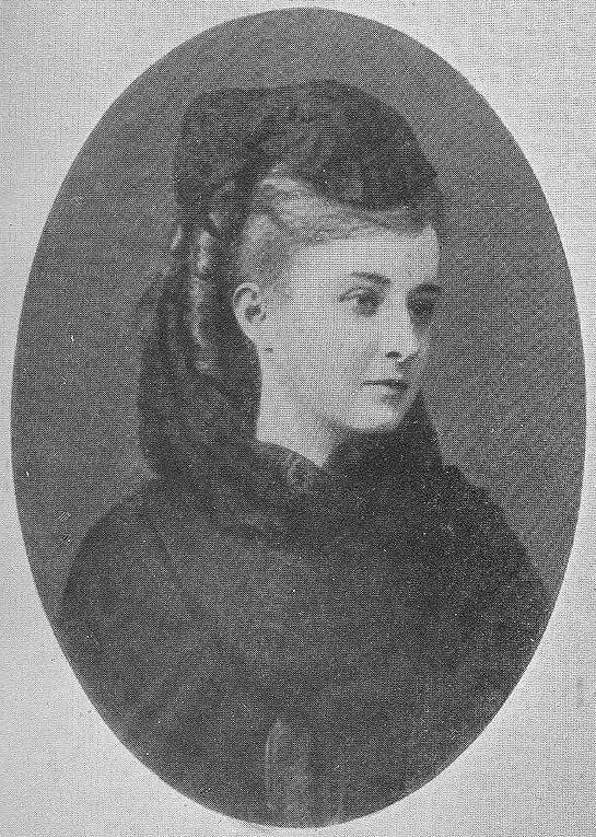 Evelina Cattermole 1875